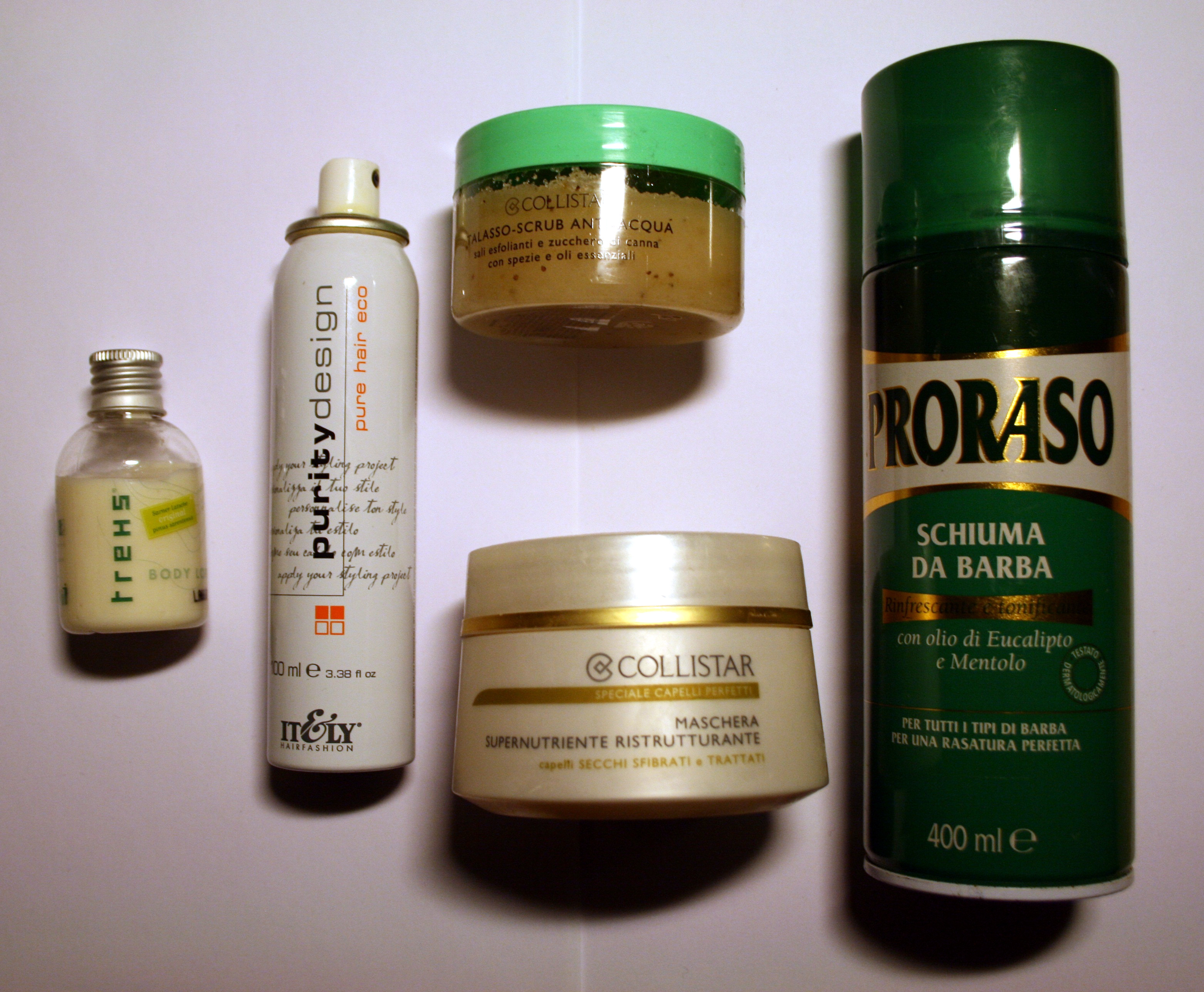 Prodotti per la cura della persona di marchi italiani famosi di alta qualità: da sinistra: una lozione corpo Trehs di produzione semi-artigianale del Trentino-Alto Adige un deodorante It&li "PurityDesign" una maschera per capelli COLLISTAR uno scrub (gommage) corpo COLLISTAR una schiuma da barba Proraso